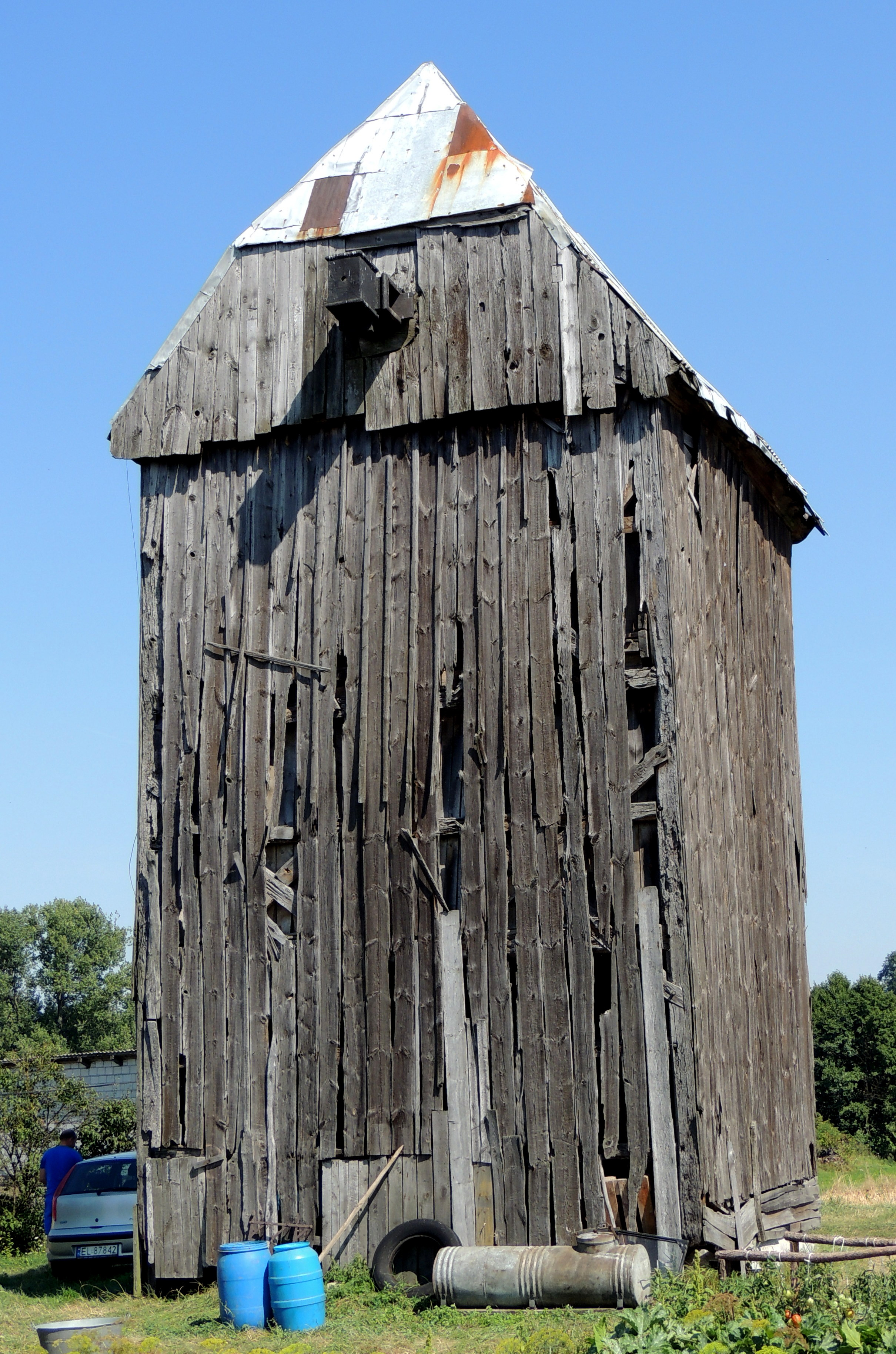 Siedlątków, wiatrak, XIX